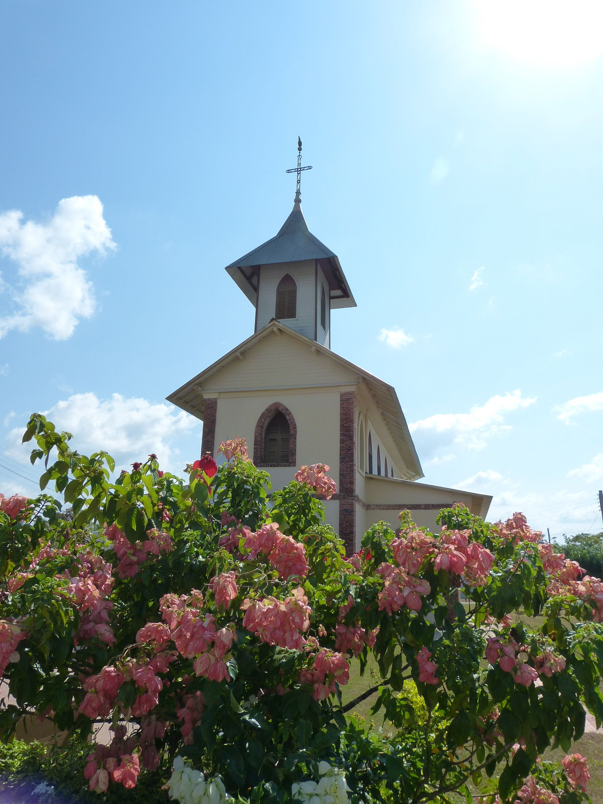 Église Saint-Jean-Baptiste de Montsinéry, sur la commune de Montsinéry-Tonnégrande (Guyane)